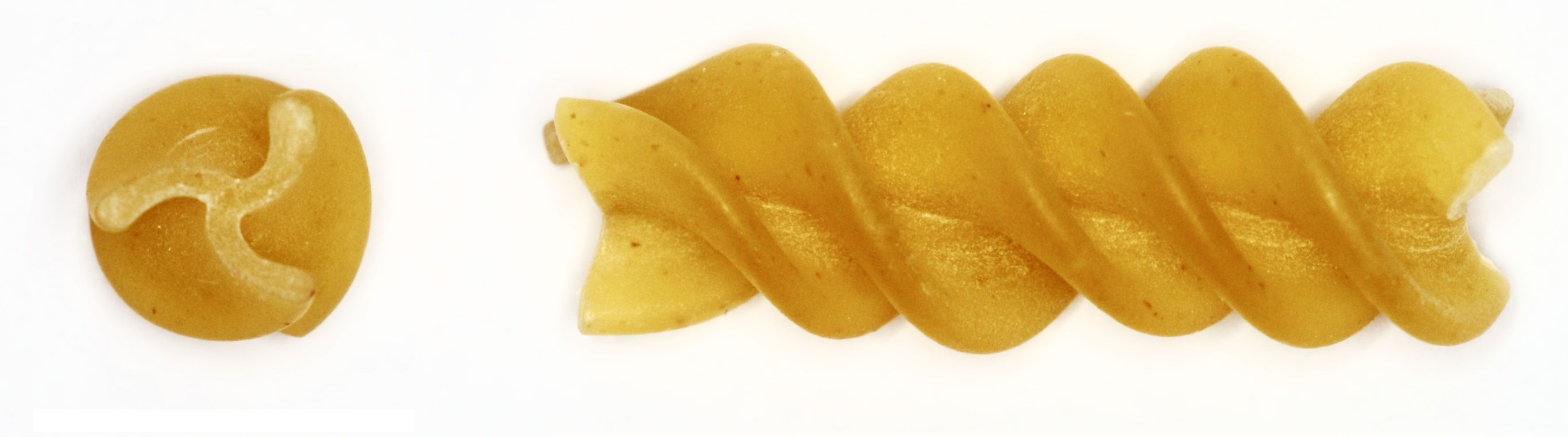 Dreifache Helix am Beispiel einer Fusilli